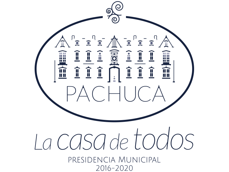 Logotipo del ayuntamiento de la ciudad de Pachuca de Soto, en la administración del 2016 al 2020